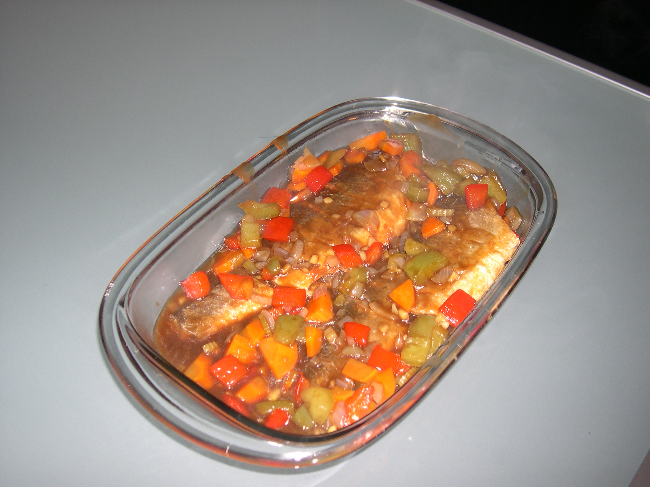 Escabeche (Vis met rinse groentesaus) een gerecht uit de Filipijnse keuken